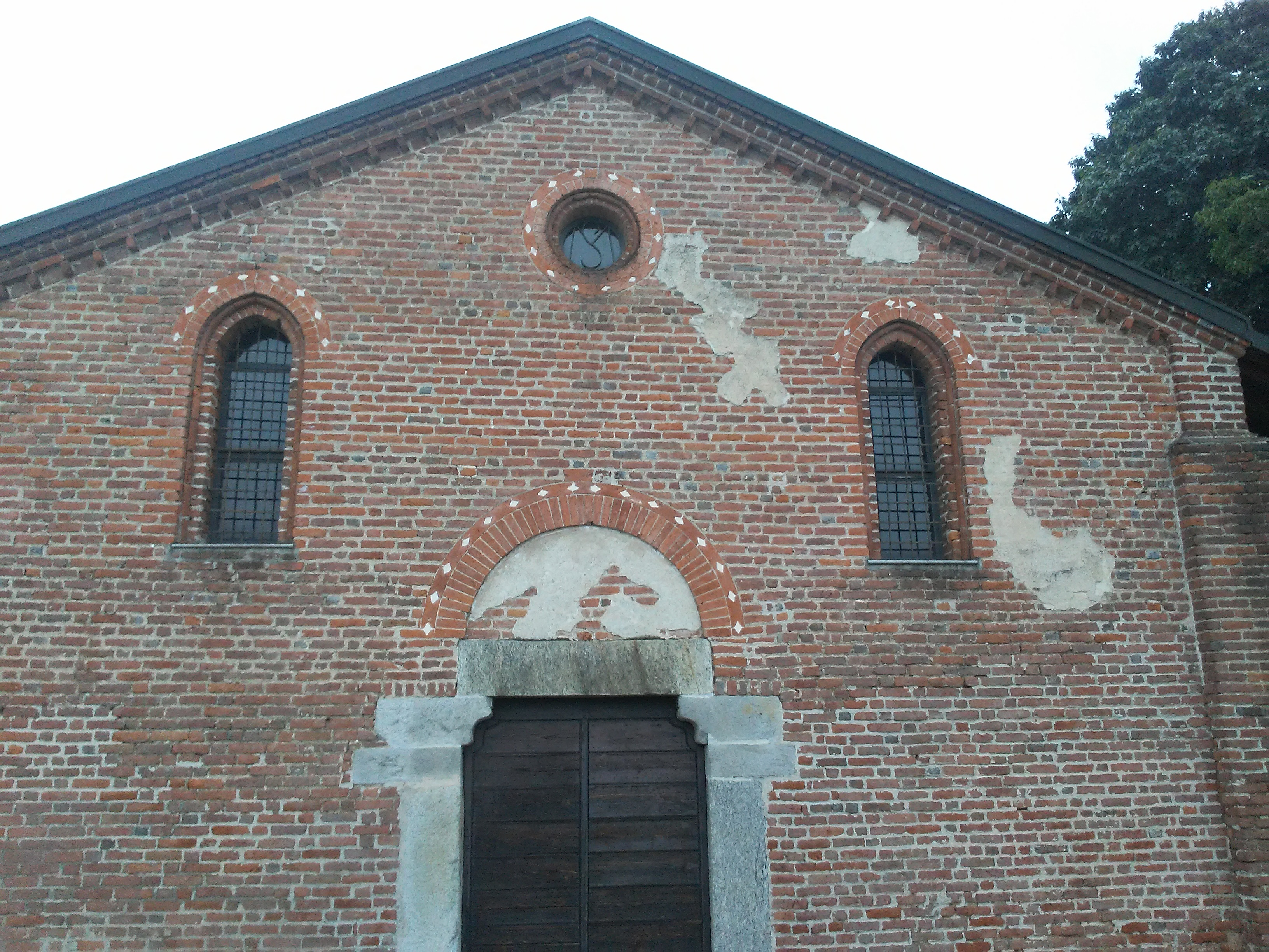 Lumbaart: La Badia de Santa Maria Rossa in Cusagh